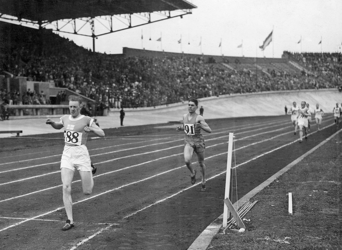 Olympische Spelen 1928 Amsterdam, Nederland : De finish van de 1500 m hardlopen : De Fin Harri Edvin Larva klopt de Fransman Jules Ladoumèque en de Fin Purje.